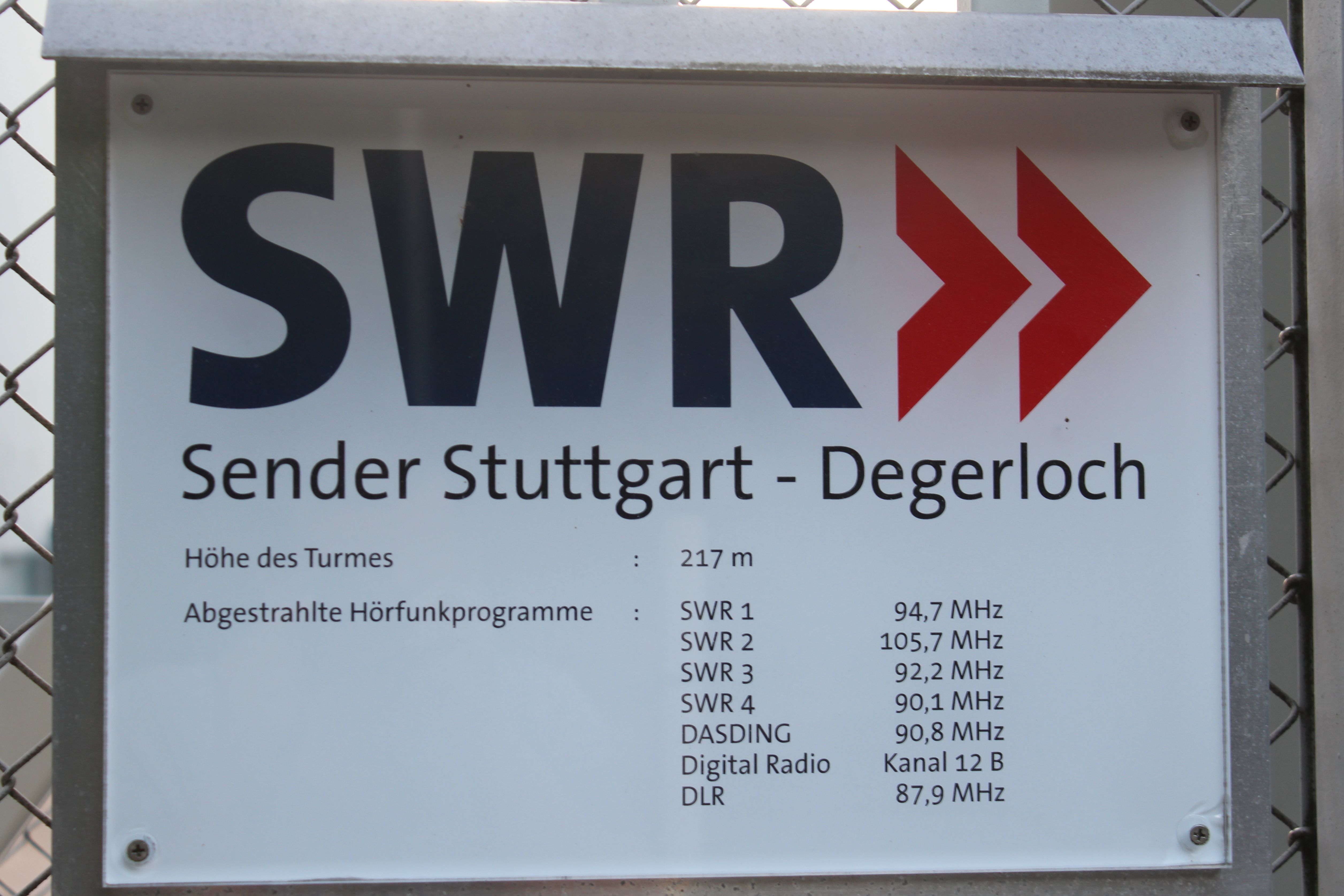 Informationstafel am Eingang zum Sendergebäude des Stuttgarter Fernsehturms